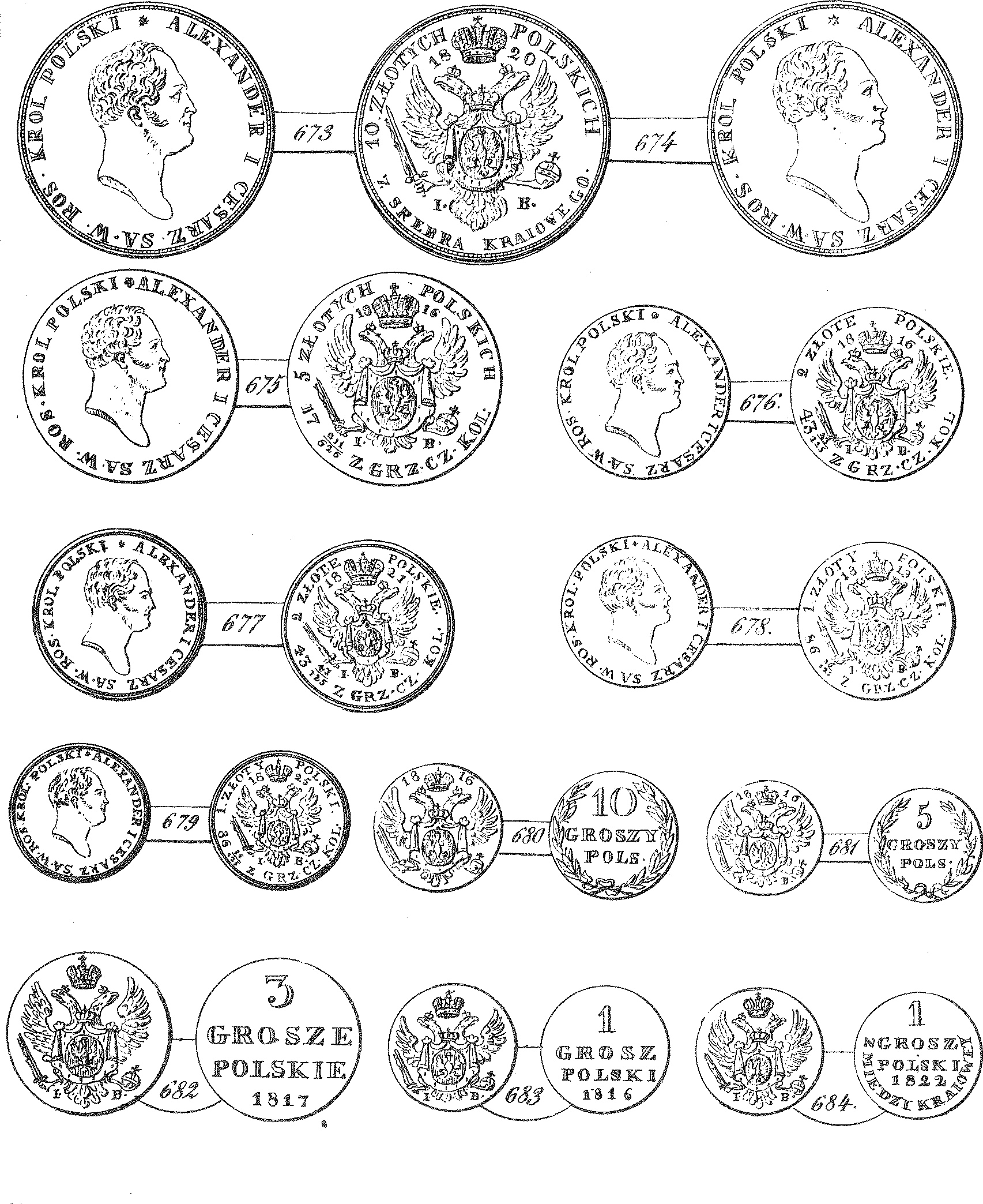 Monety polskie Królestwa Polskiego Aleksandra I